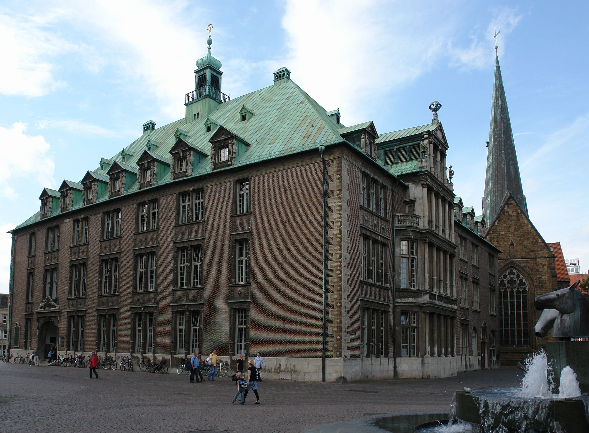 Neues Rathaus in Bremen, Kirche Unser Lieben Frauen, Neptunbrunnen.Das abgebildete Objekt ist ein geschütztes Kulturdenkmal in der Freien Hansestadt Bremen, mit der Nr. 0066,T003 beim Landesamt für Denkmalpflege registriert.